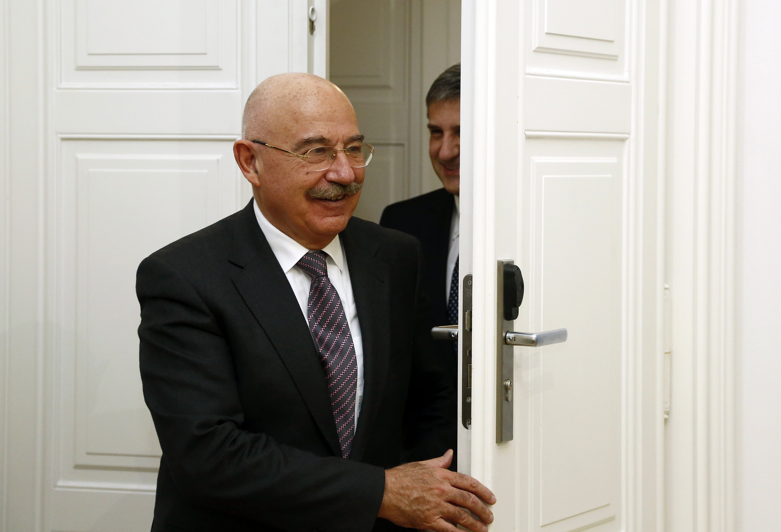 Außenminister Michael Spindelegger empfängt seinen ungarischen Amtskollegen Janos Martonyi zu einem Gespräch, Wien, 05.12.2012, Foto: Dragan Tatic